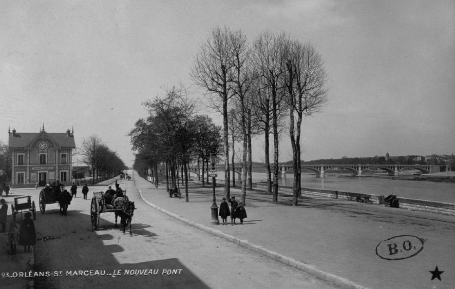 L’ancien pont du Maréchal Joffre vu des quais d'Orléans Saint-Marceau (construit en 1905, détruit en 1940) sur la Loire, Orléans, Loiret, France